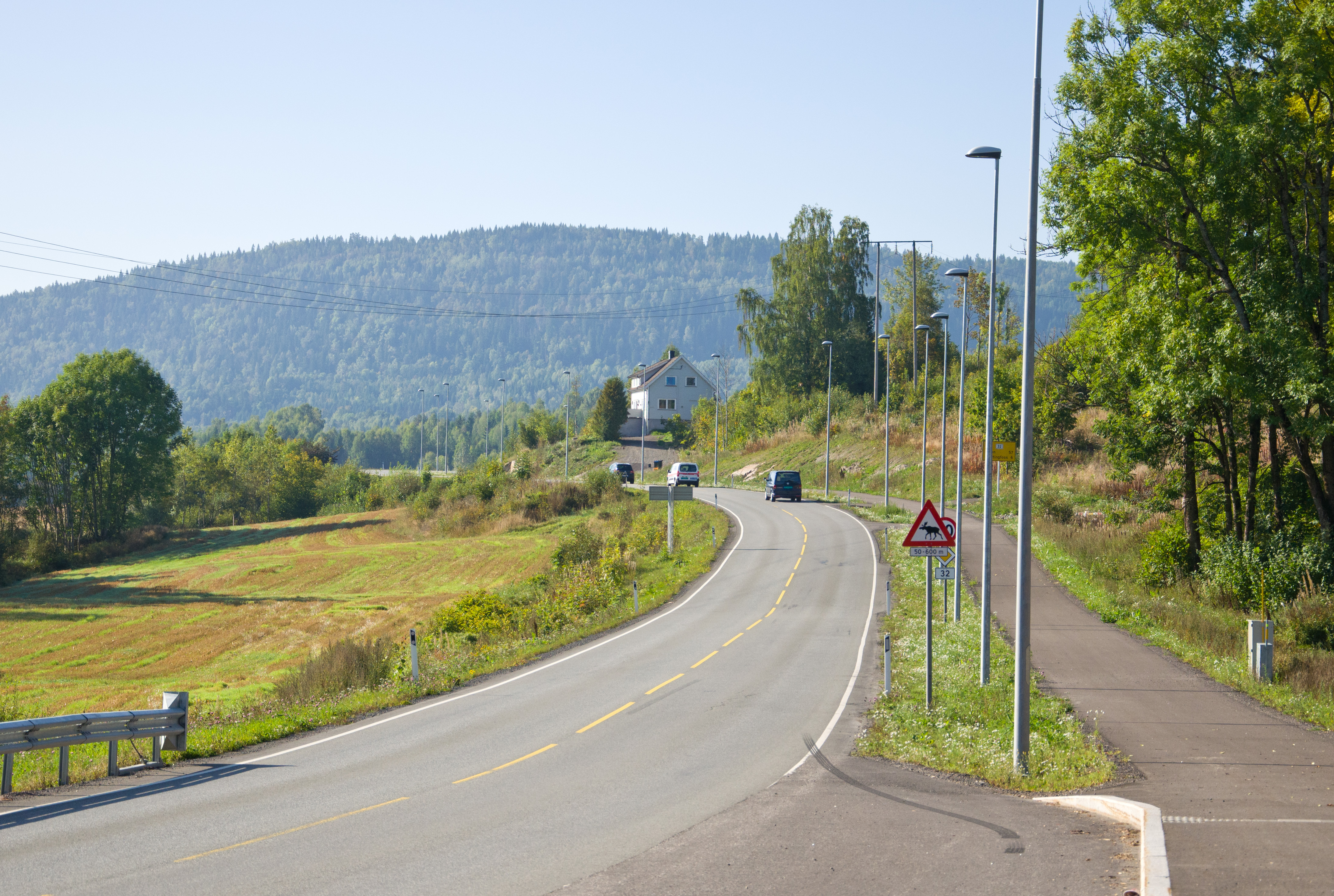 Fylkesvei 32 Hvittingfossveien ved Haslestad